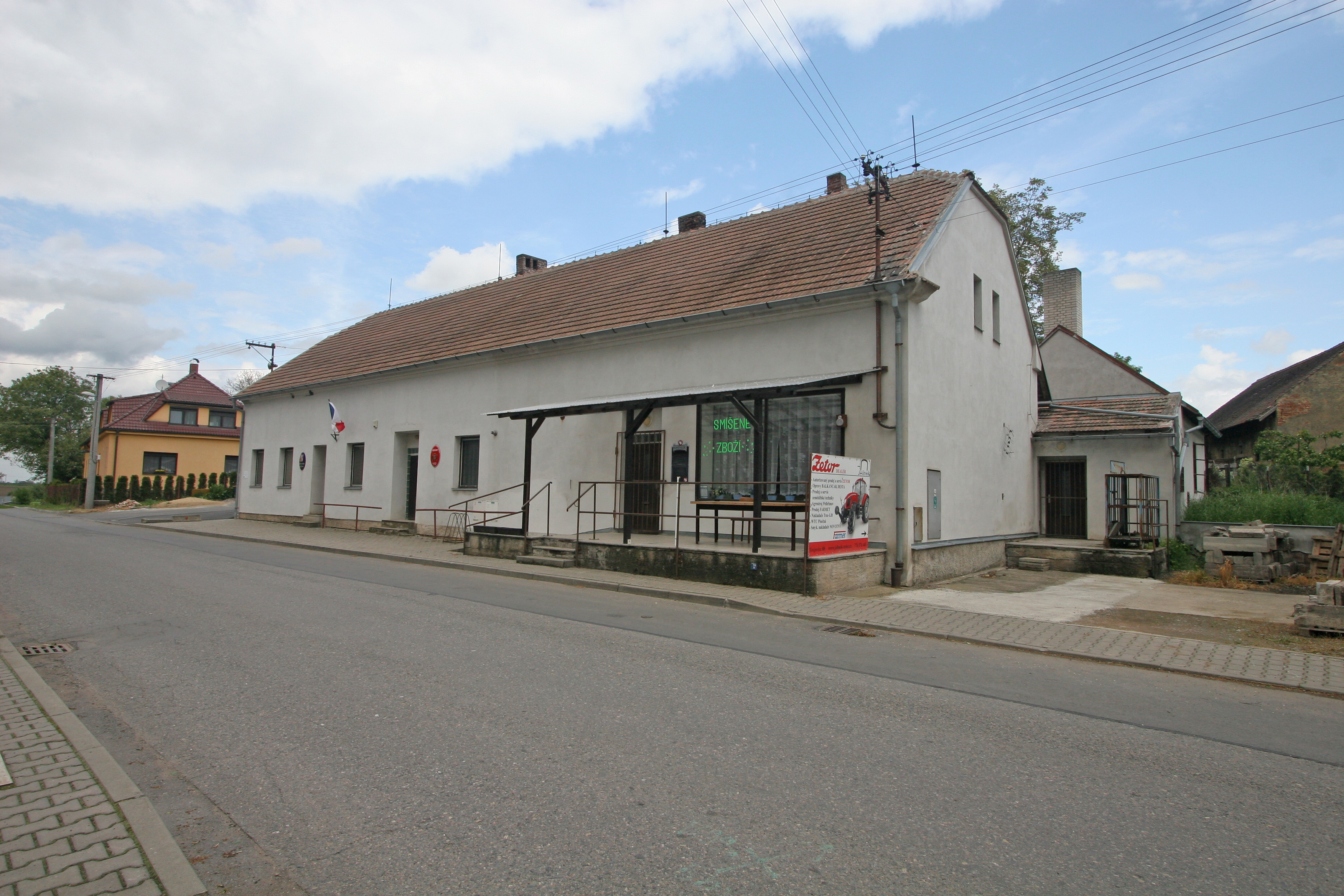 Nabočany obecní úřad